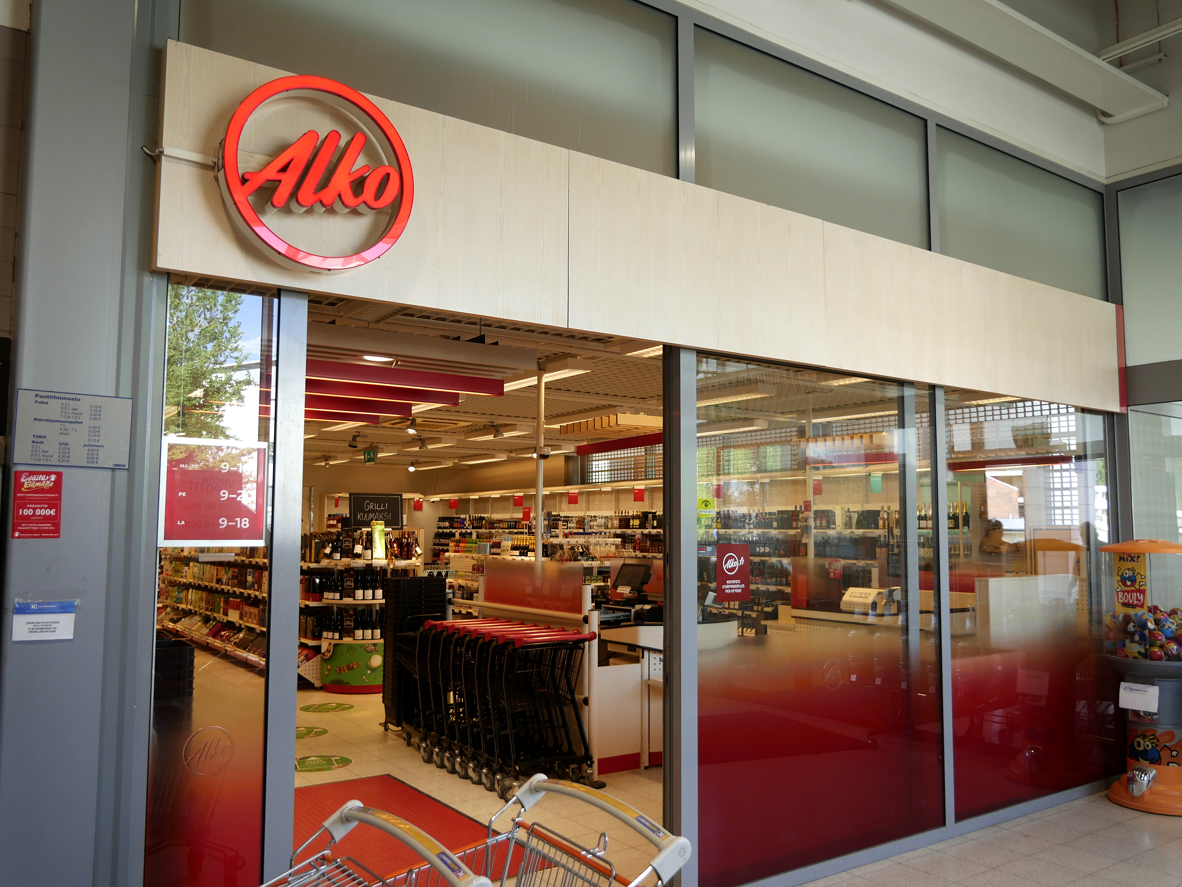 Alavuden Alko.